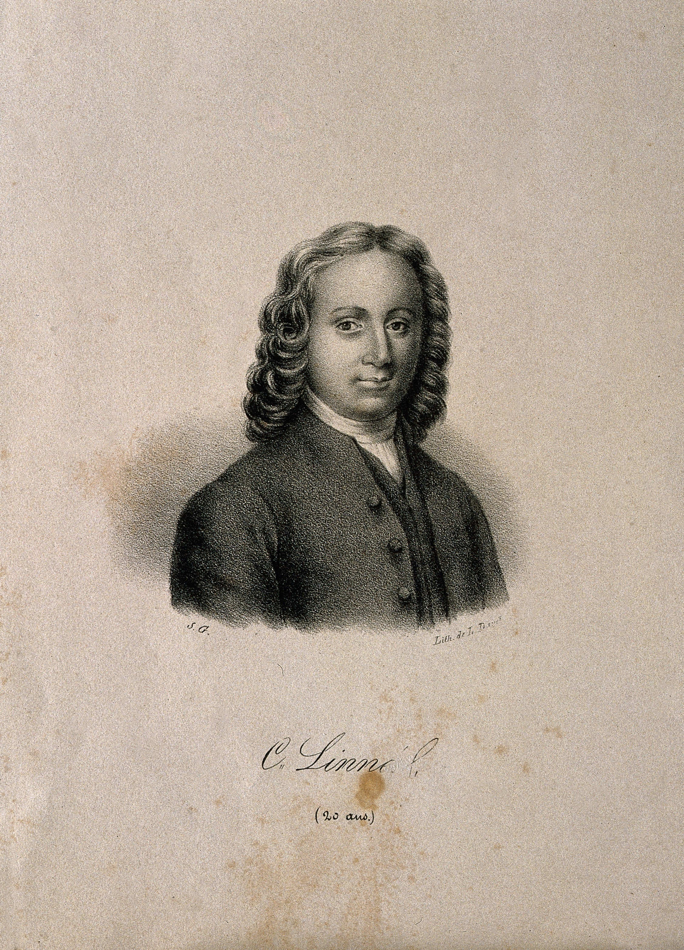 Genre/Technique: Portrait prints. Lithographs. Subject name: Linné, Carl von, 1707-1778.